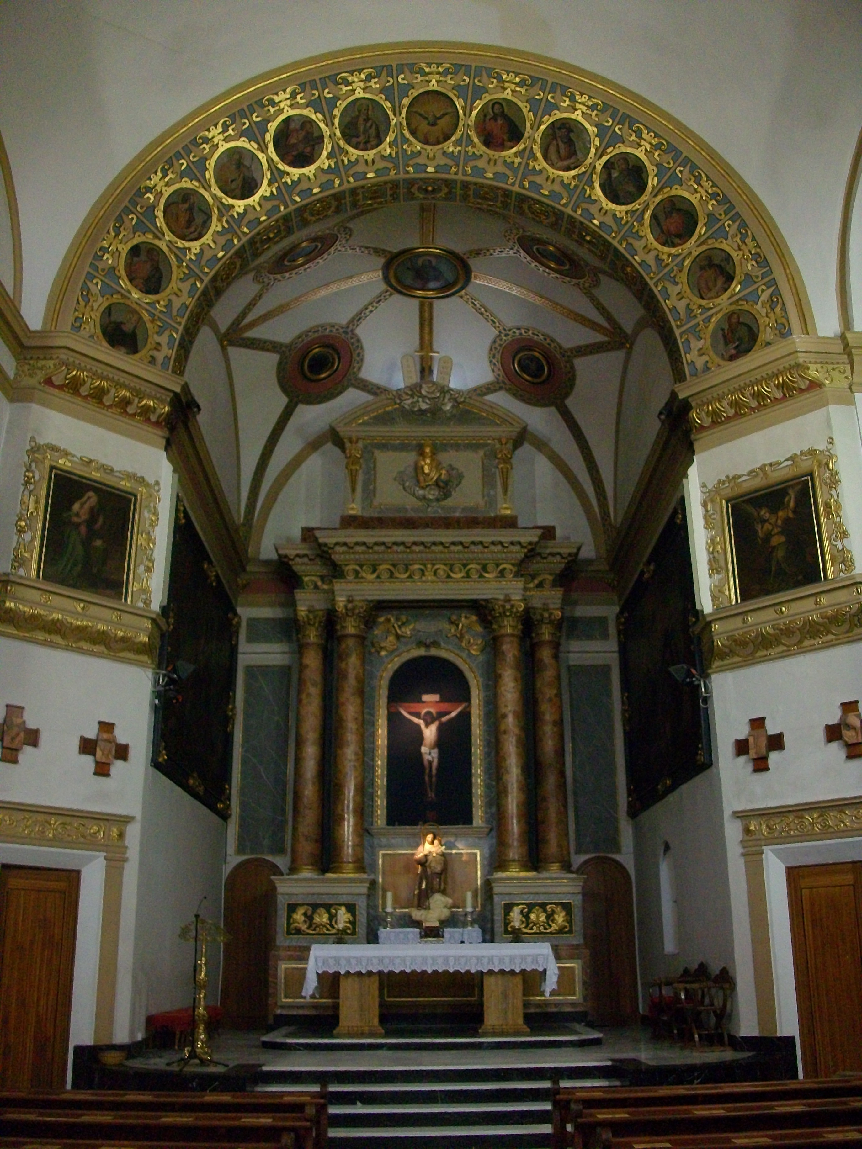 Vista de l'altar major de l'església del Salvador de Cocentaina, País Valencià.